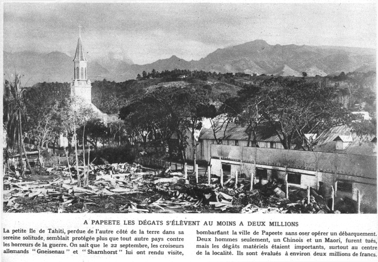 La ville de Papeete bombardée par la Shanrhorst et le Gneisenau le 22 septembre 1914, on consate ici les dégats.